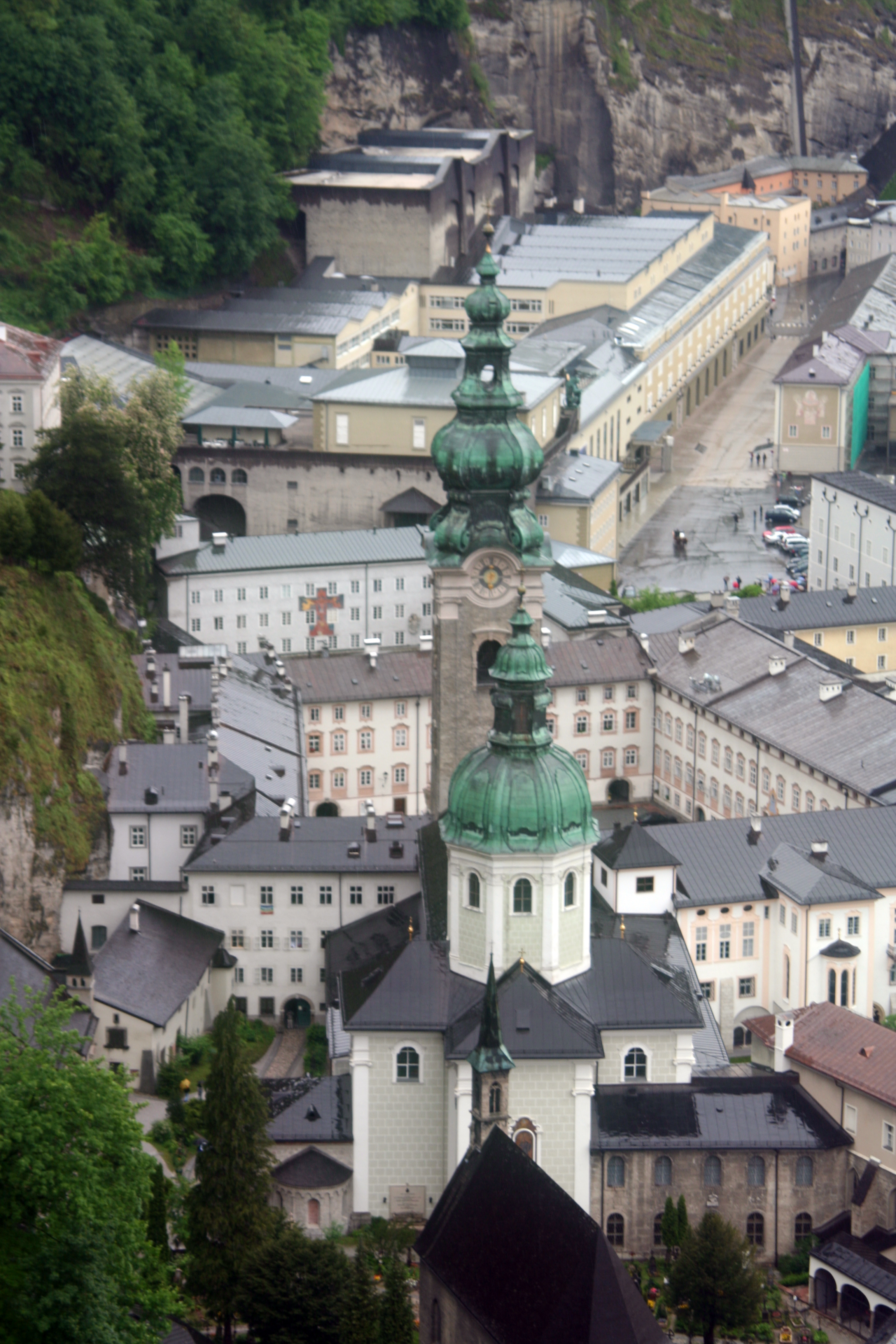 Erzabtei Sankt Peter mit Stiftskirche, Salzburg